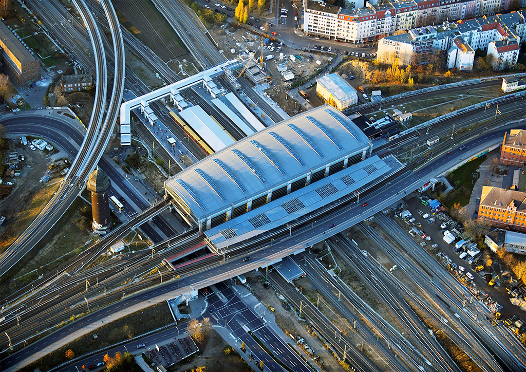 November 2018 war bis auf die Fußgängerbrücke alles fertig am Bhf. Ostkreuz.